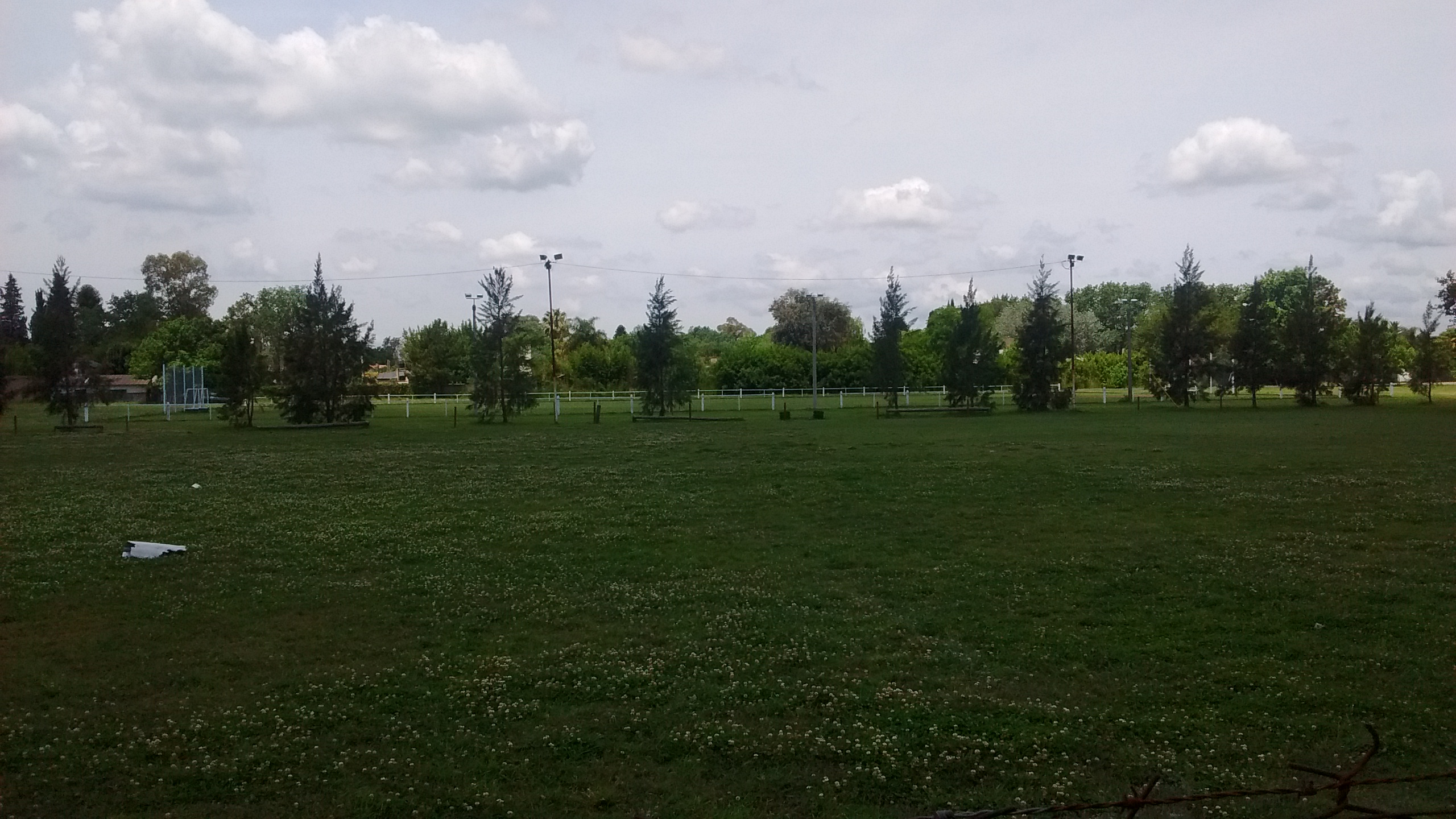 Polideportivo Humberto Illia en Funes.